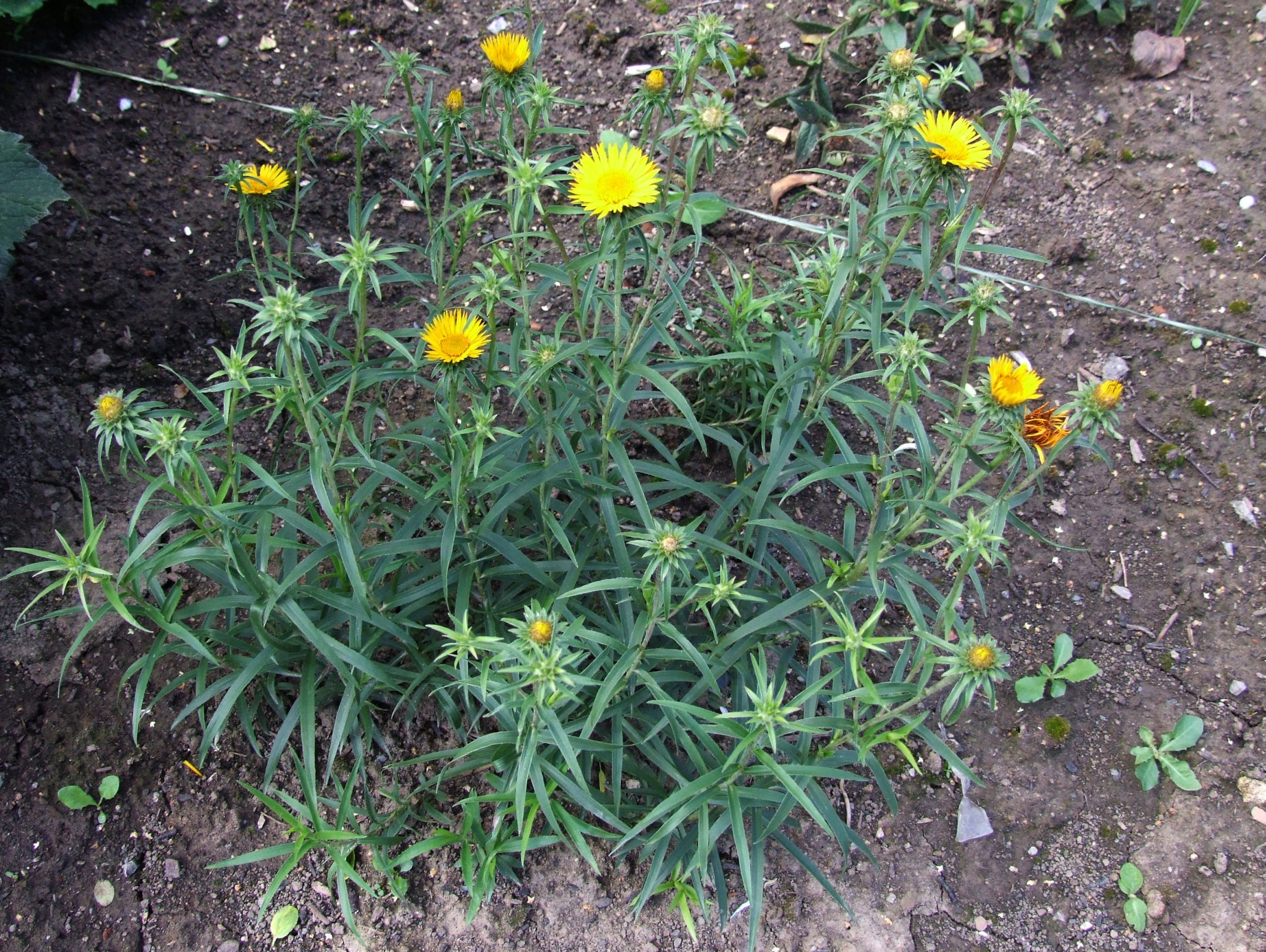 Inula_ensifolia (pl. oman wąskolistny)